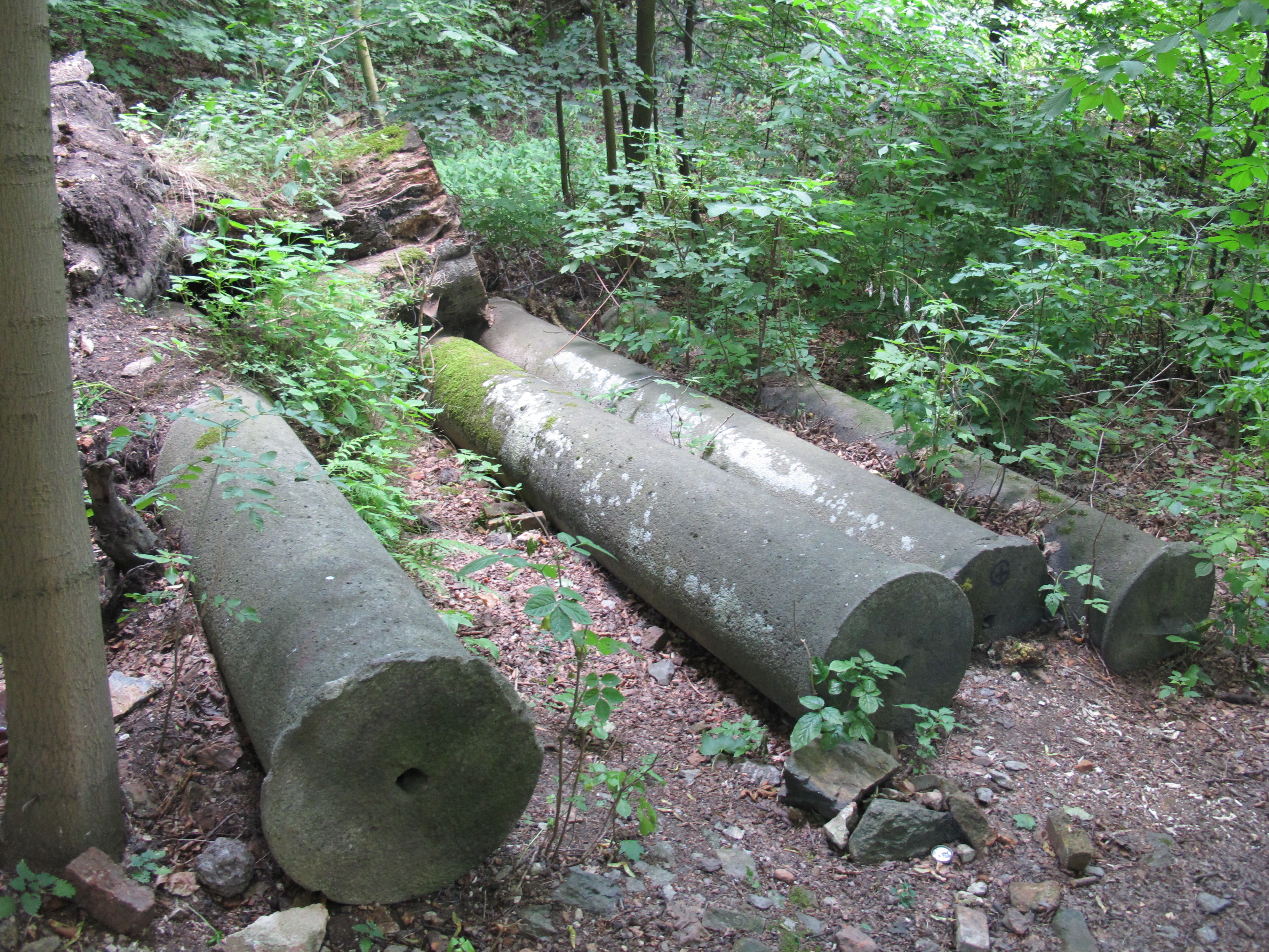 Hraběcí kaple, v lese, jihozápadně od areálu zámku, Jezeří (Horní Jiřetín).